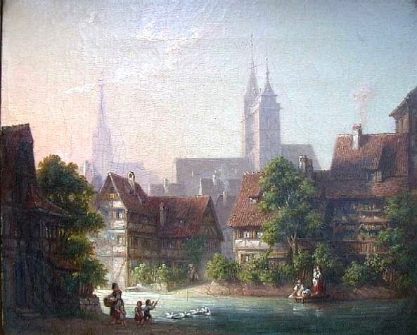 Esslingen, Öl auf Leinwand 28 x 35 cm